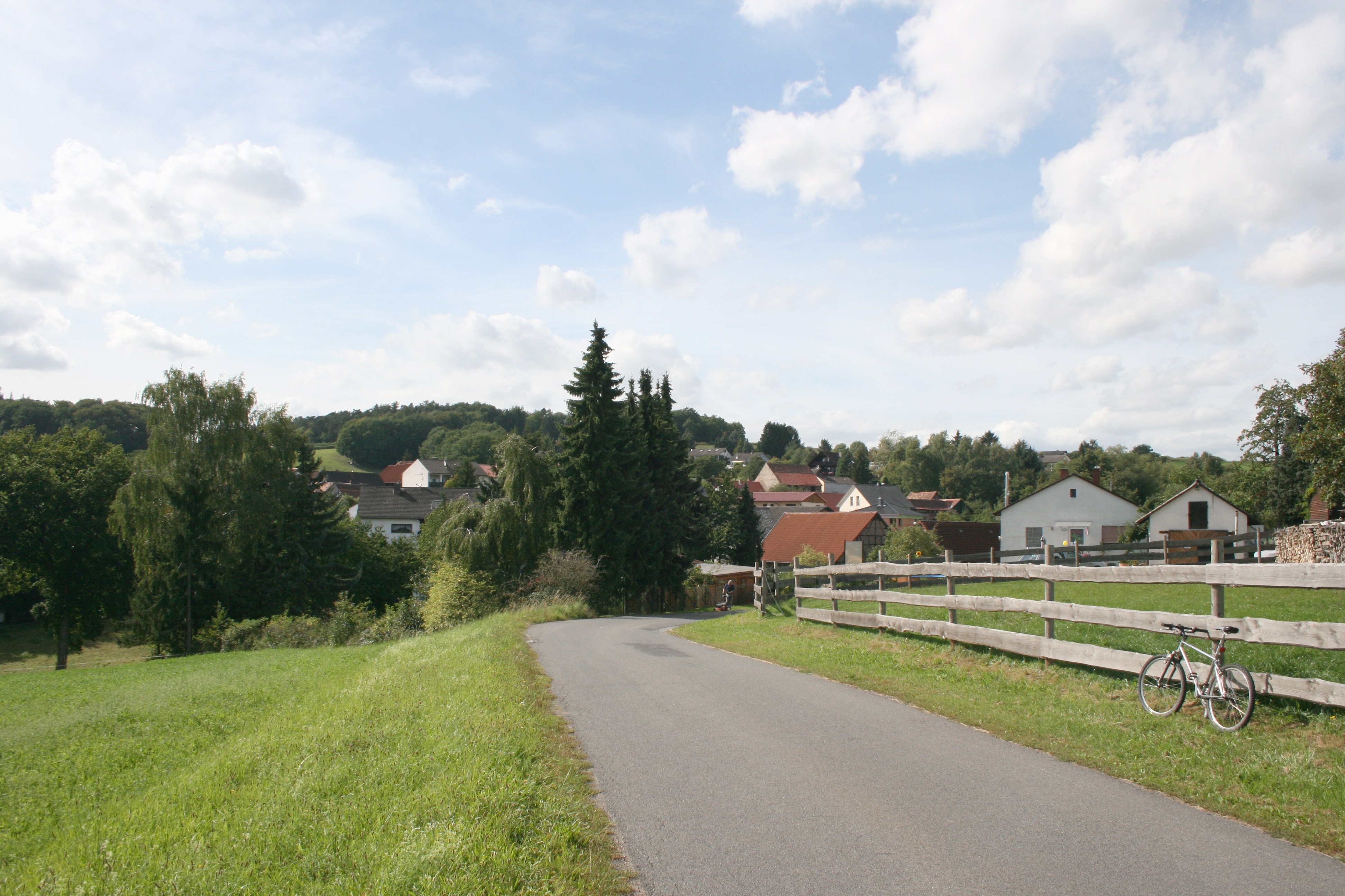 Gumpersberg, OT von Bad König im Odenwald, Ansicht von SO.